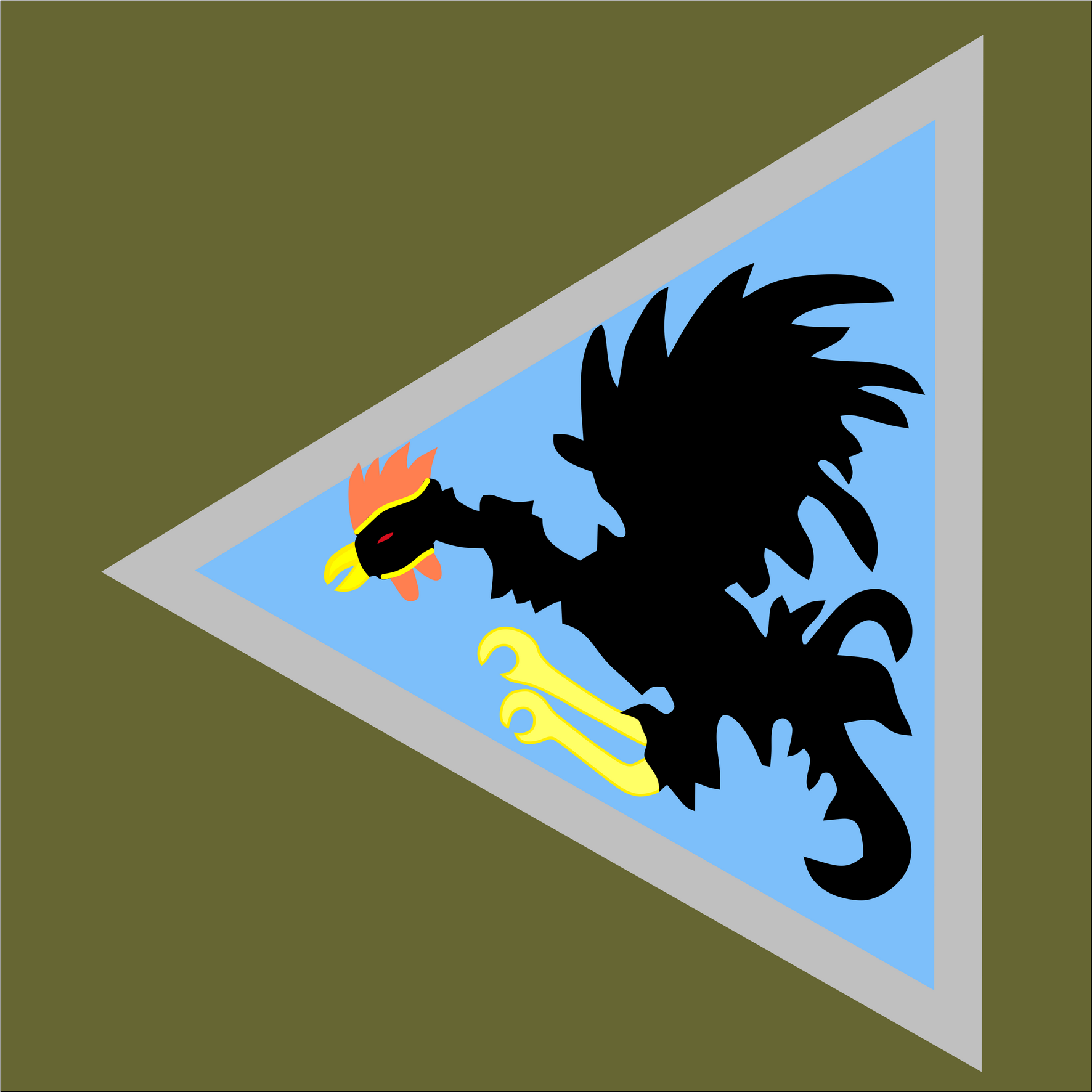 Znak malowany na samolotach 112 eskadry myśliwskiej, stosowany w latach 1927 - 1932